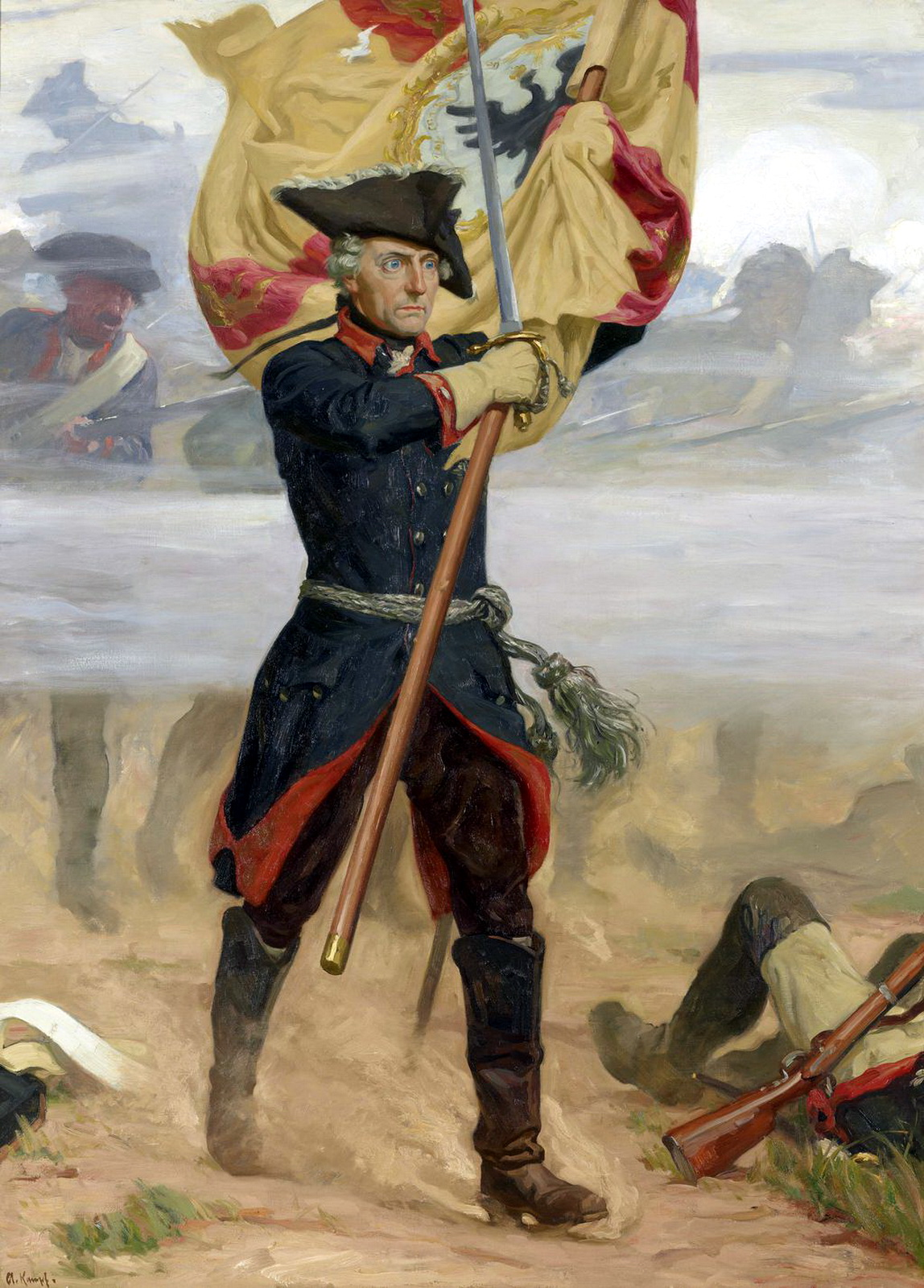 Título: Friedrich der Grosse als Fahnentrager auf dem Schlachtfeld (Frederico, o Grande, como porta-estandarte no campo de batalha)